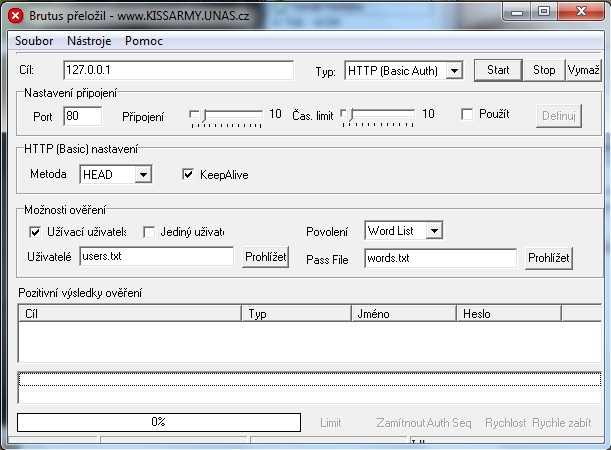 Program Brutus sloužící k prolamování hesel ftp, emailů a pod.